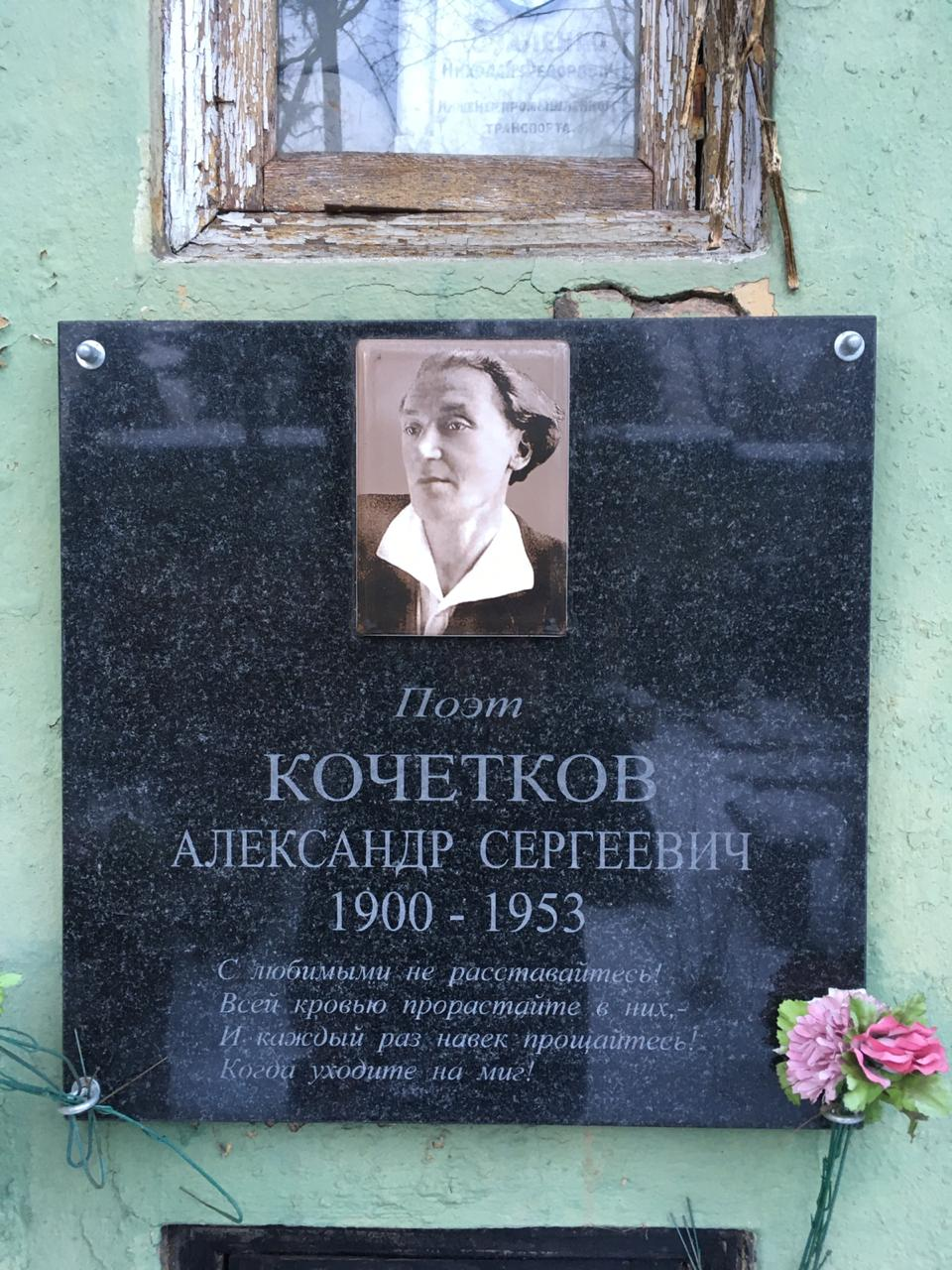 Могила Александра Кочеткова